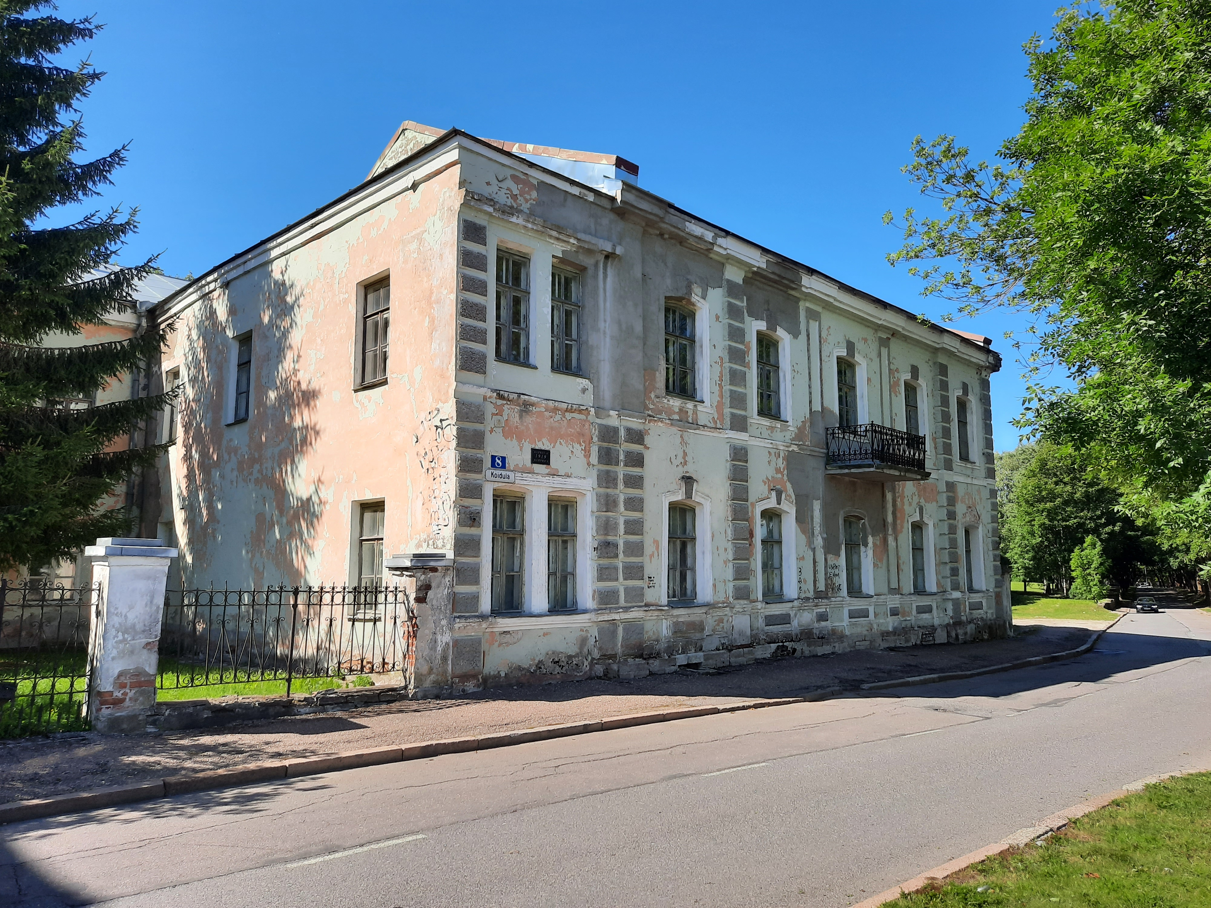 Hoone Narvas Koidula tänav 8